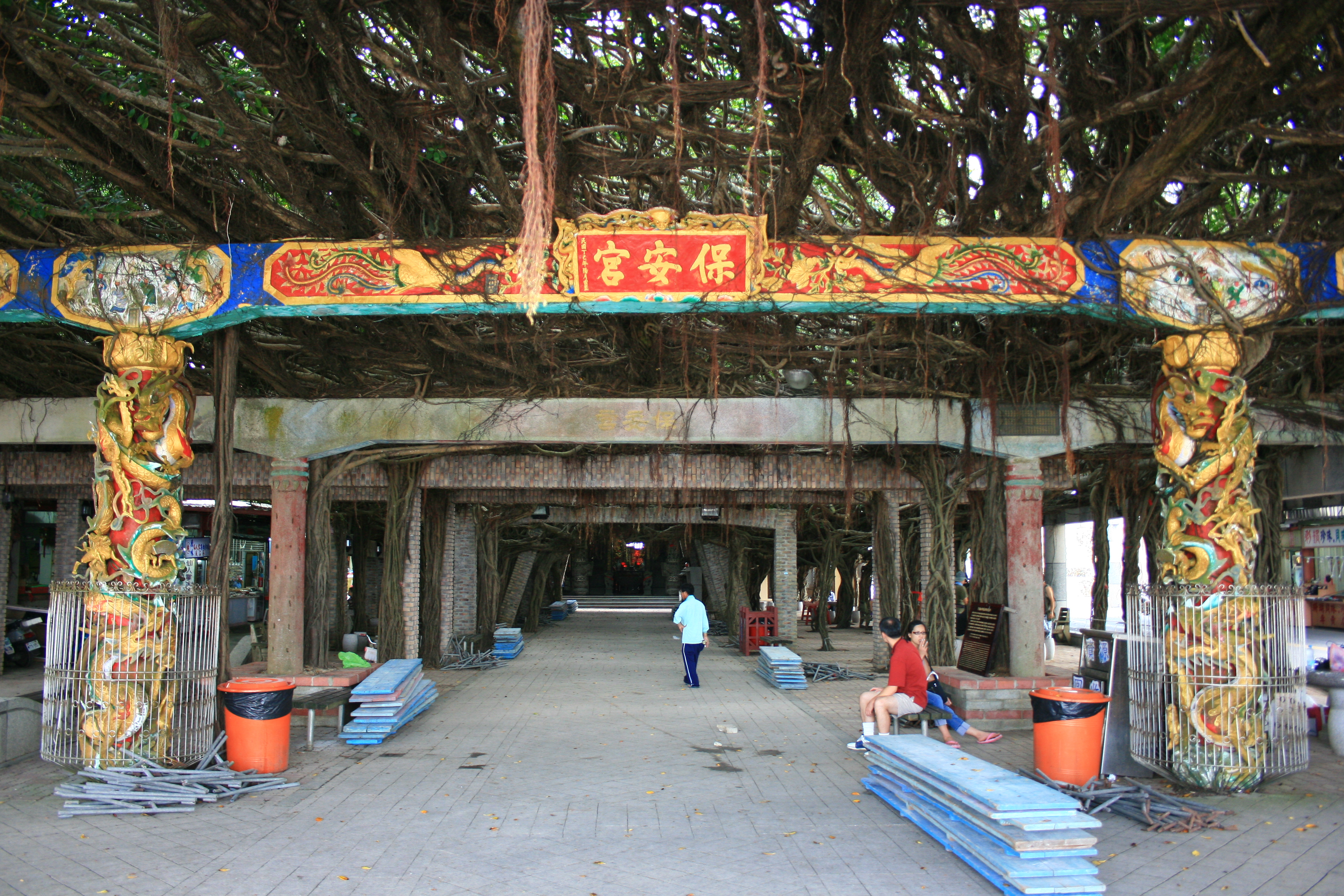 臺灣澎湖縣白沙鄉通梁村的保安宮